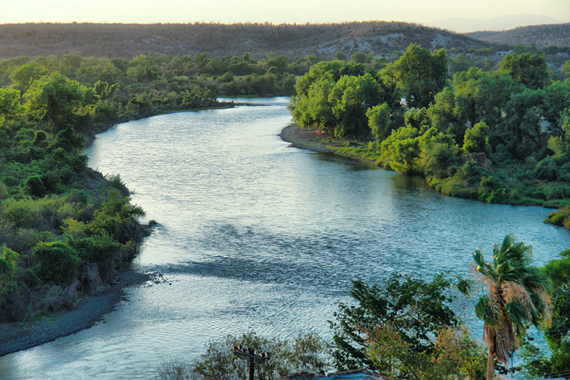 Caudal Rio Fuerte